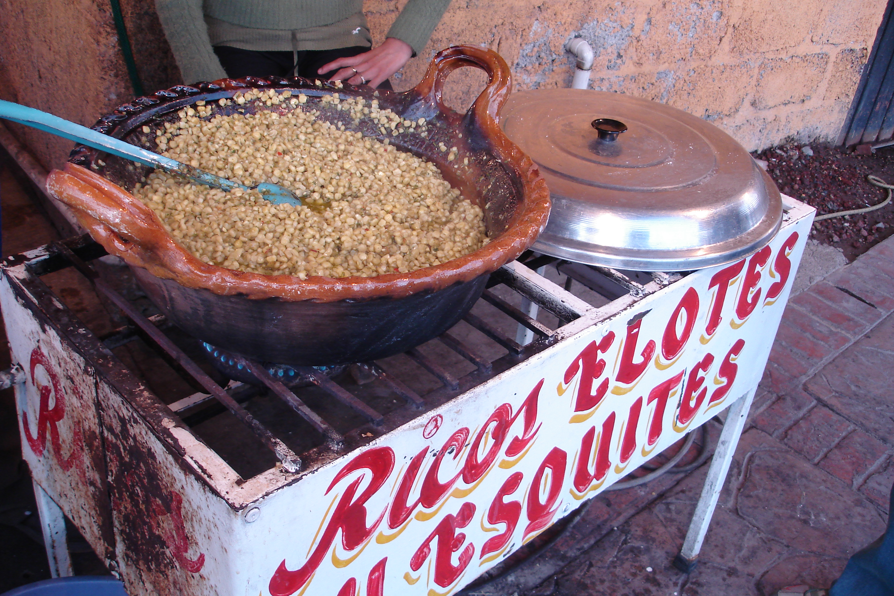 Esquites fritos en mantequilla